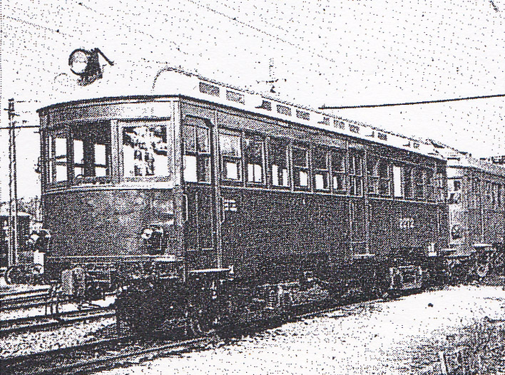 名鉄ク2270形電車。旧・名古屋電気鉄道1500形として1920年新製。撮影場所不詳（名鉄瀬戸線 喜多山工場？）。